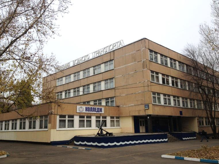 Учебный корпус